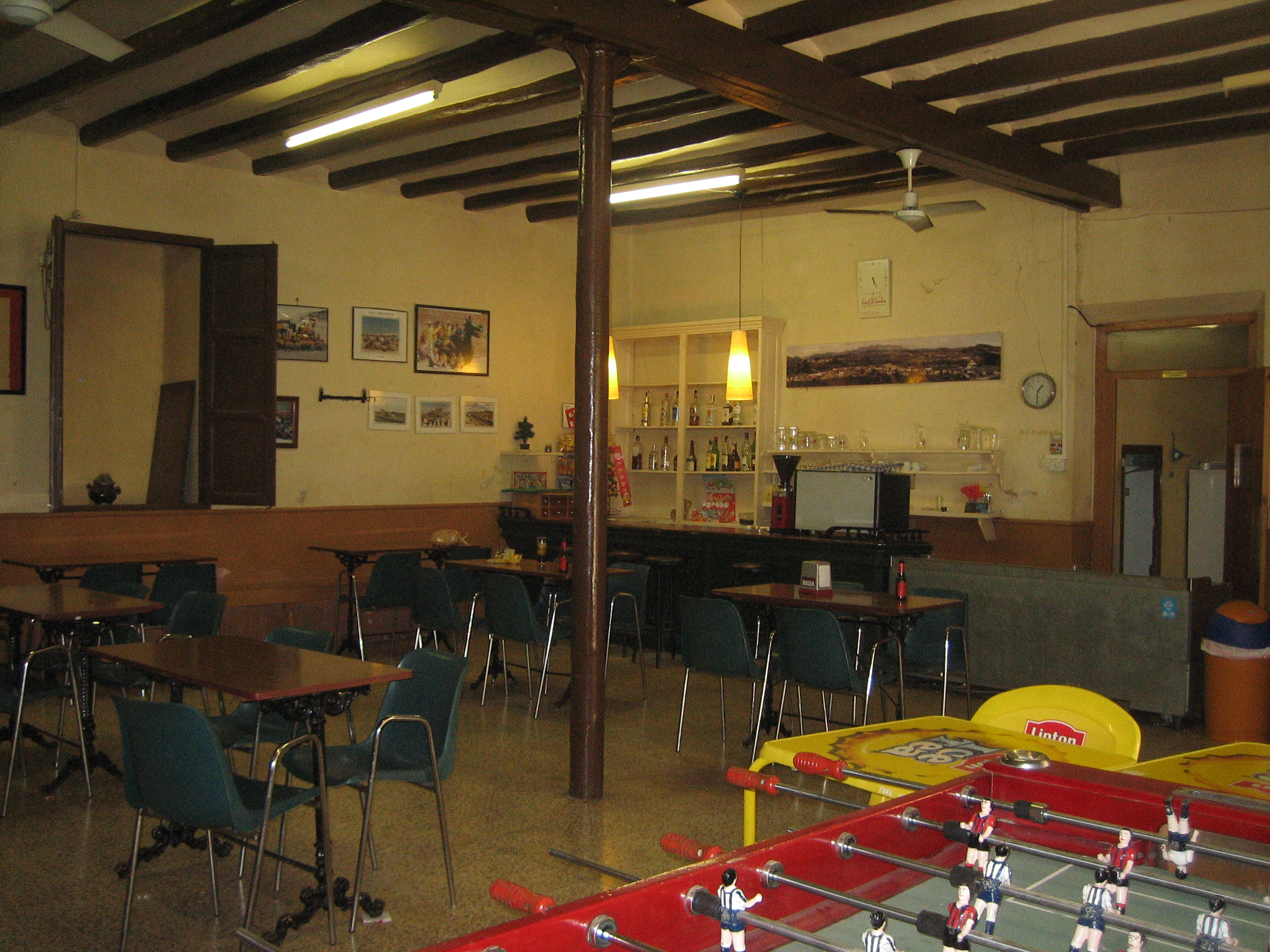 old Cafè from Lavern